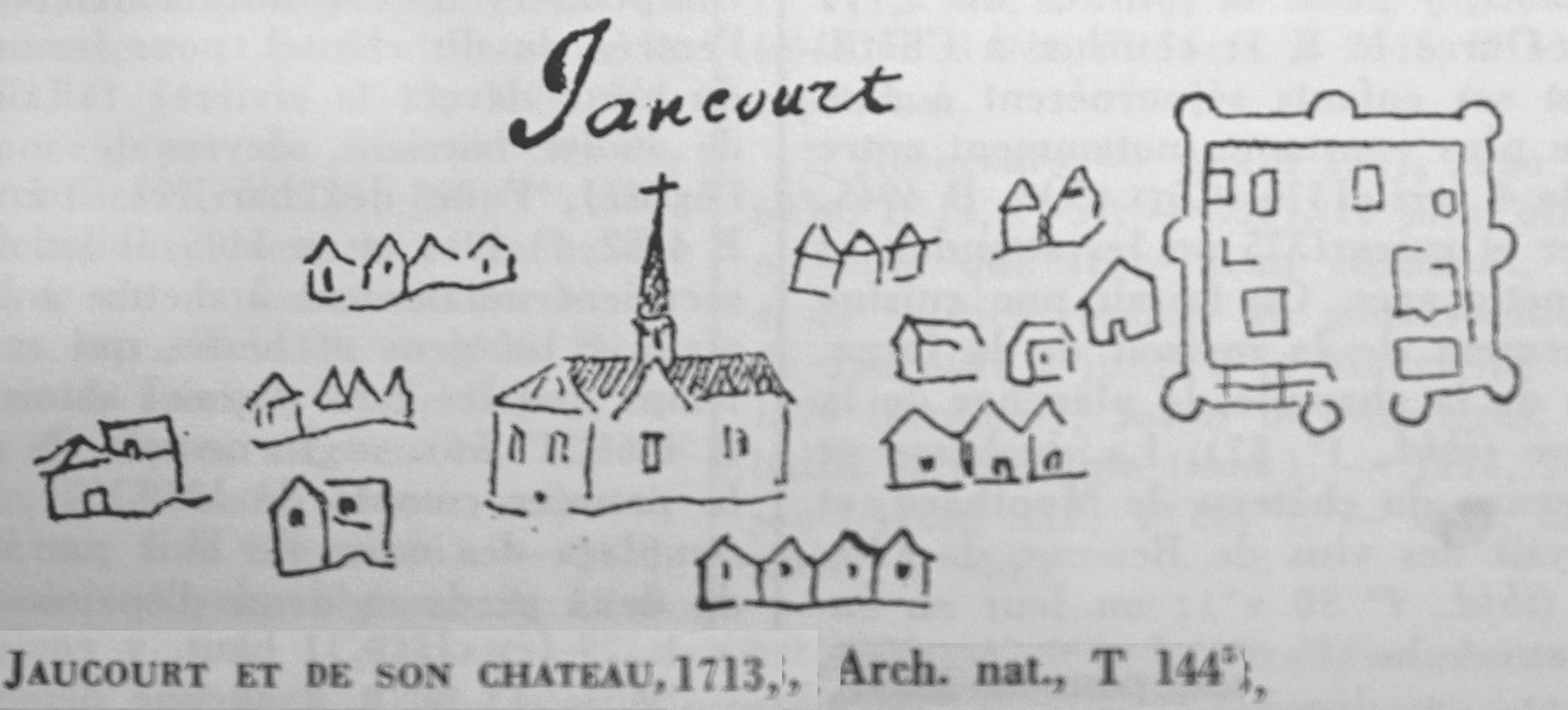 issu du fond de la BD.